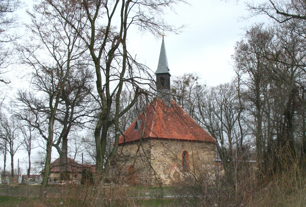 Kaplica Ewangelicko-Augsburska w Paruszowicach